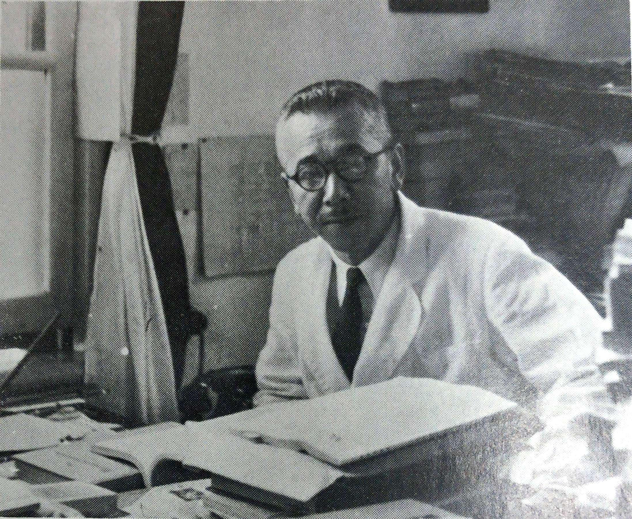 昭和17年6月 教授室にて撮影